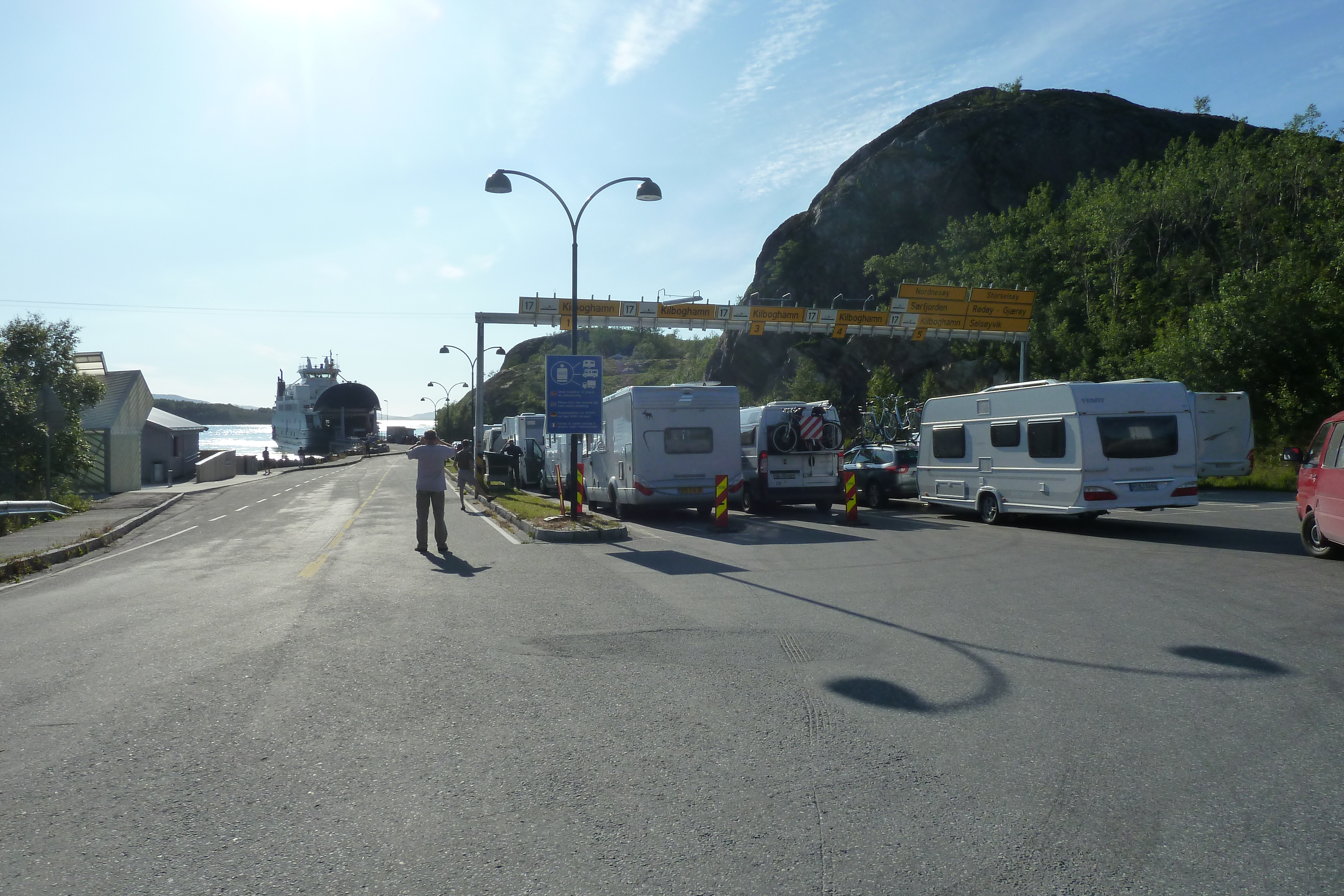 Fergekø på Jektvik fergekai sommeren 2011. MF 'Rødøy' (IMO 9030357) på vei inn til kai.